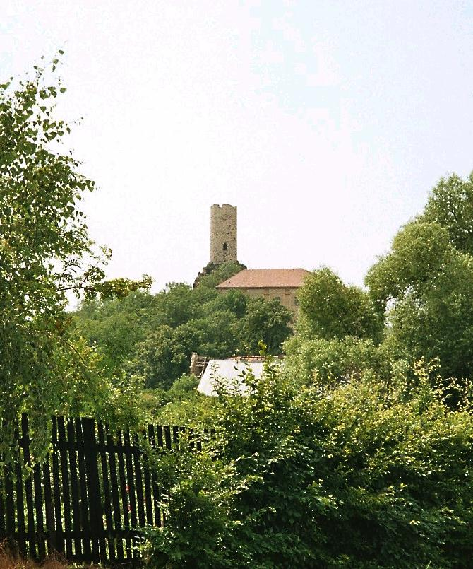 Hrad a zámek Skalka ve Vlastislavi, okres Litoměřice